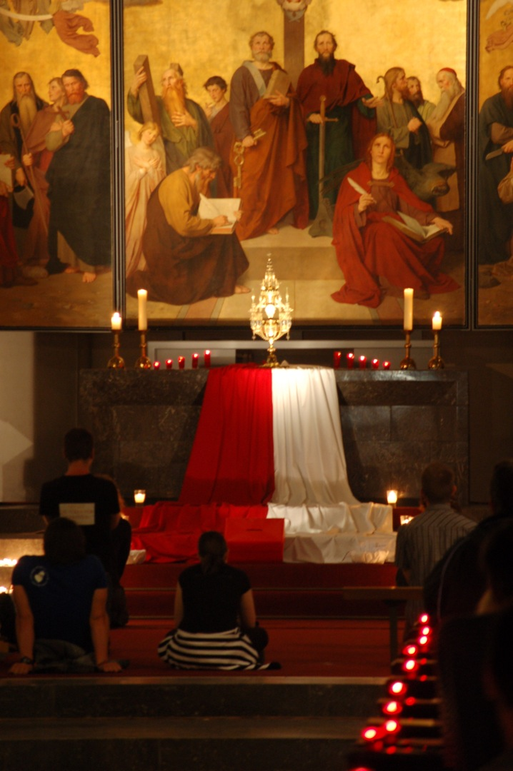 Nightfever Bonn - ein Eindruck vom Abend voll von Gebet-Gesang-Gespräch